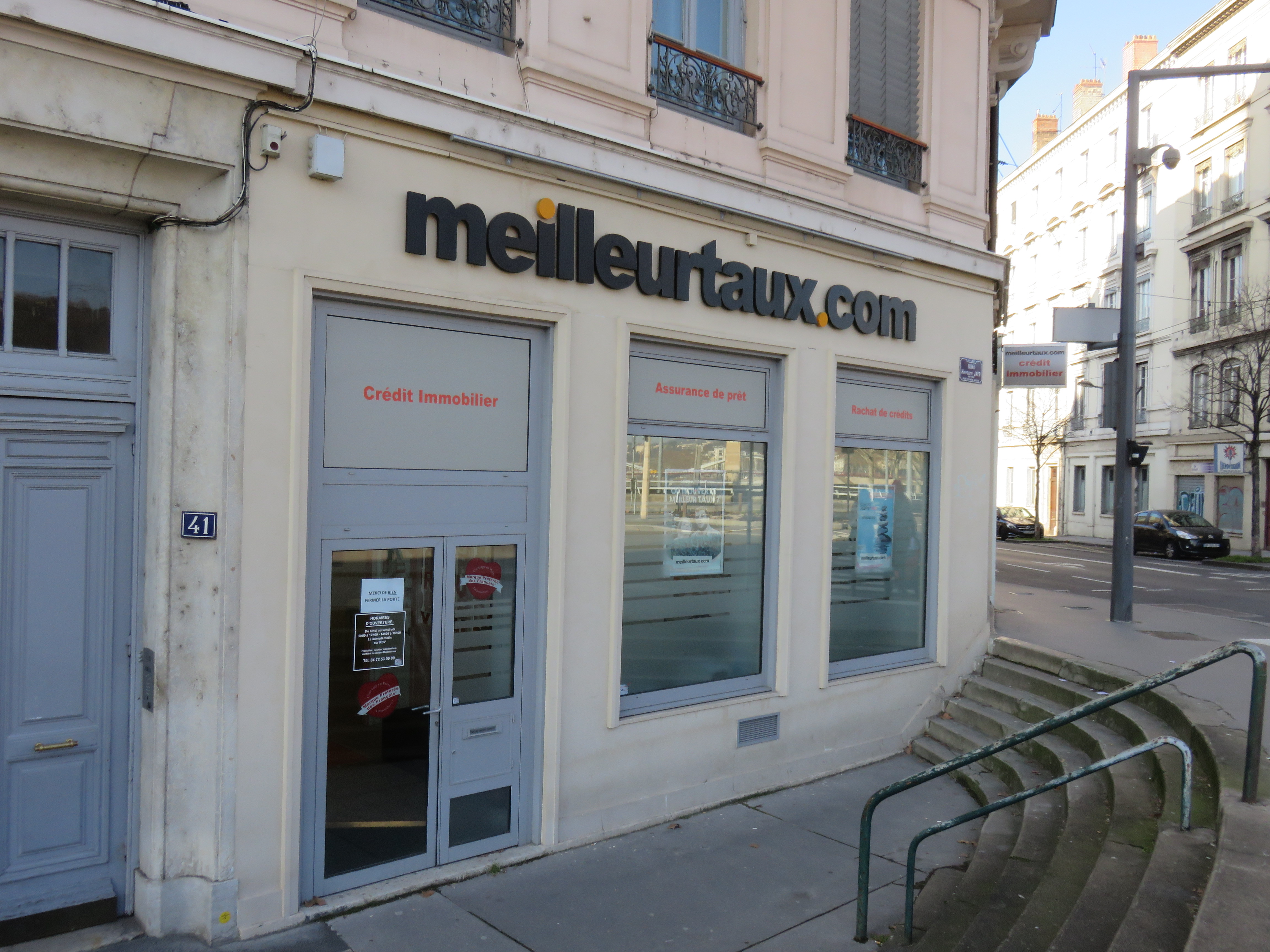 Agence , quai Hippolyte-Jayr, dans le 9e arrondissement de Lyon.